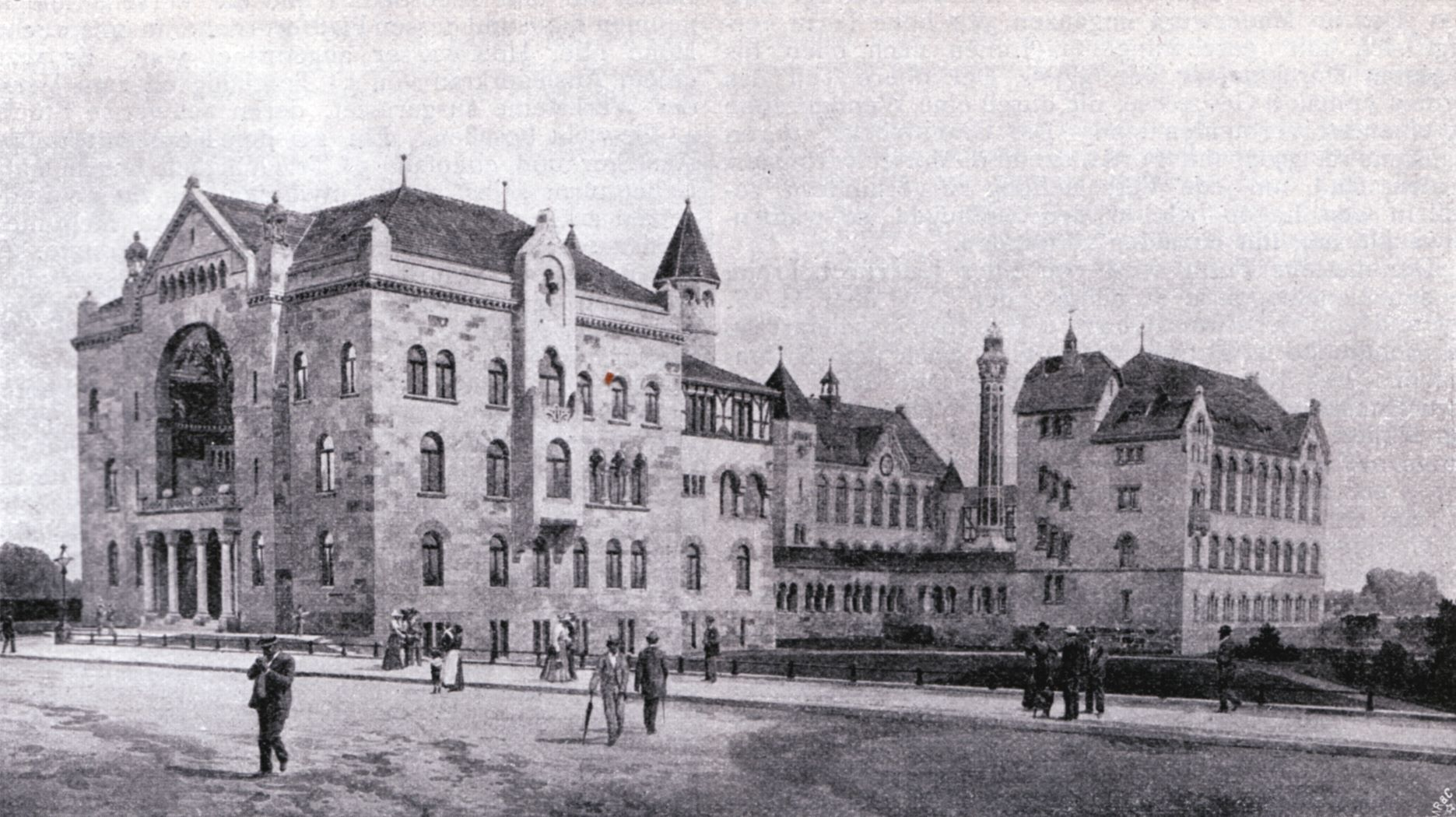 Berlin - Glasmosaikanstalt Puhl & Wagner, Ansicht des Entwurfs von Franz Schwechten